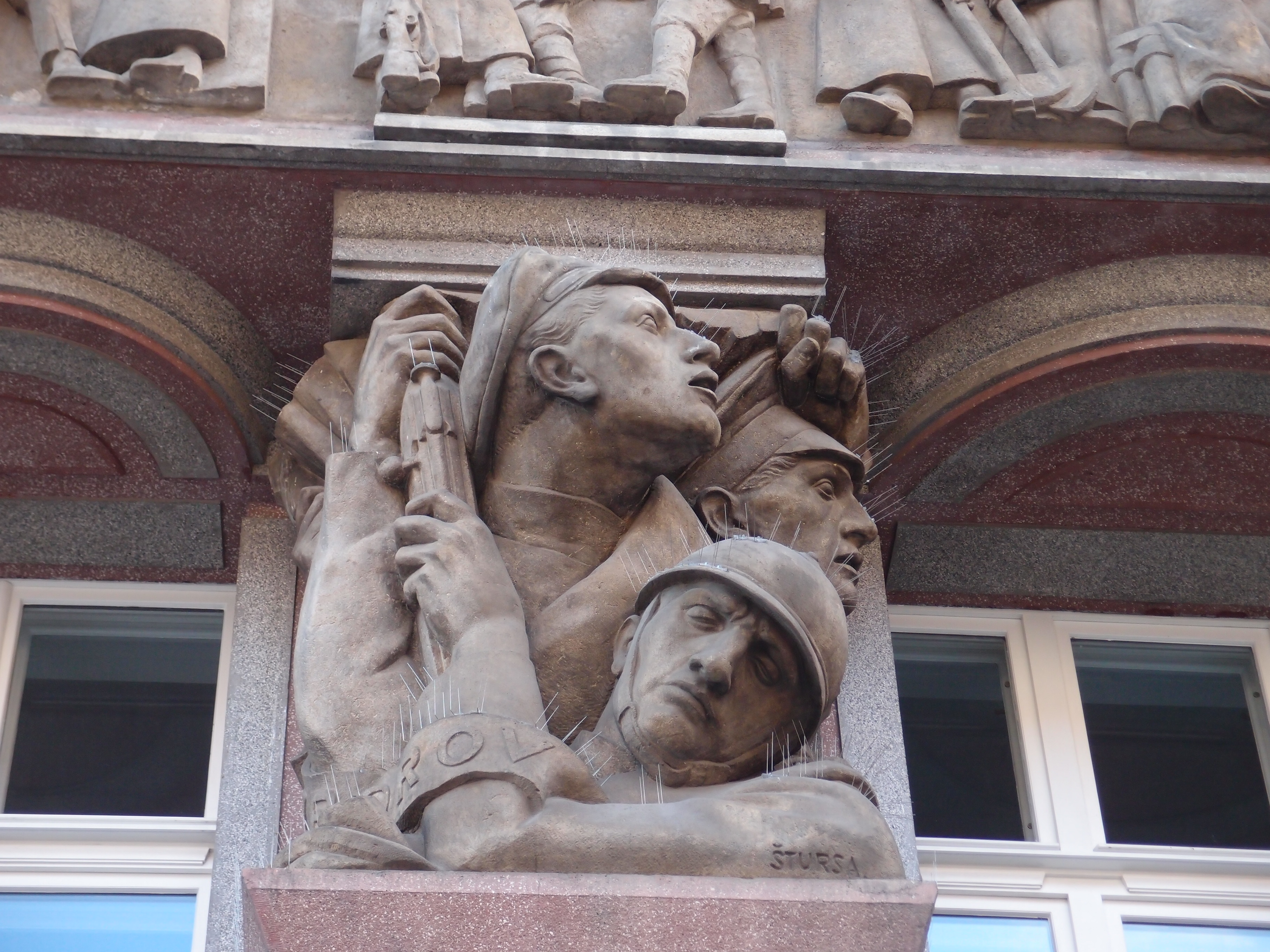 Banka (Nové Město), Praha 1, Na Poříčí 1046/24, Nové Město